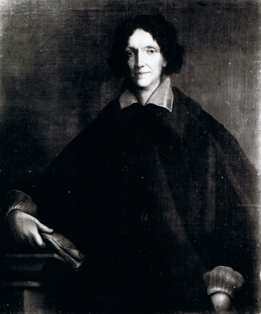 Ritratto di Maddalena Campiglia (1553-1595), poetessa italiana